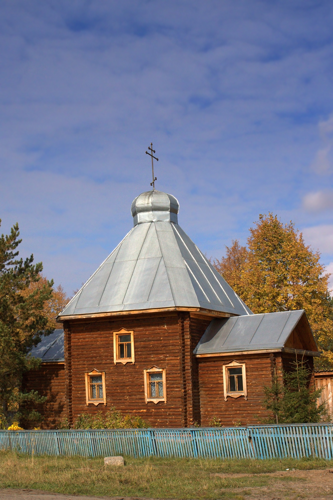 Часовня Николая Чудотворца в селе Бутаково Знаменского района Омской области.